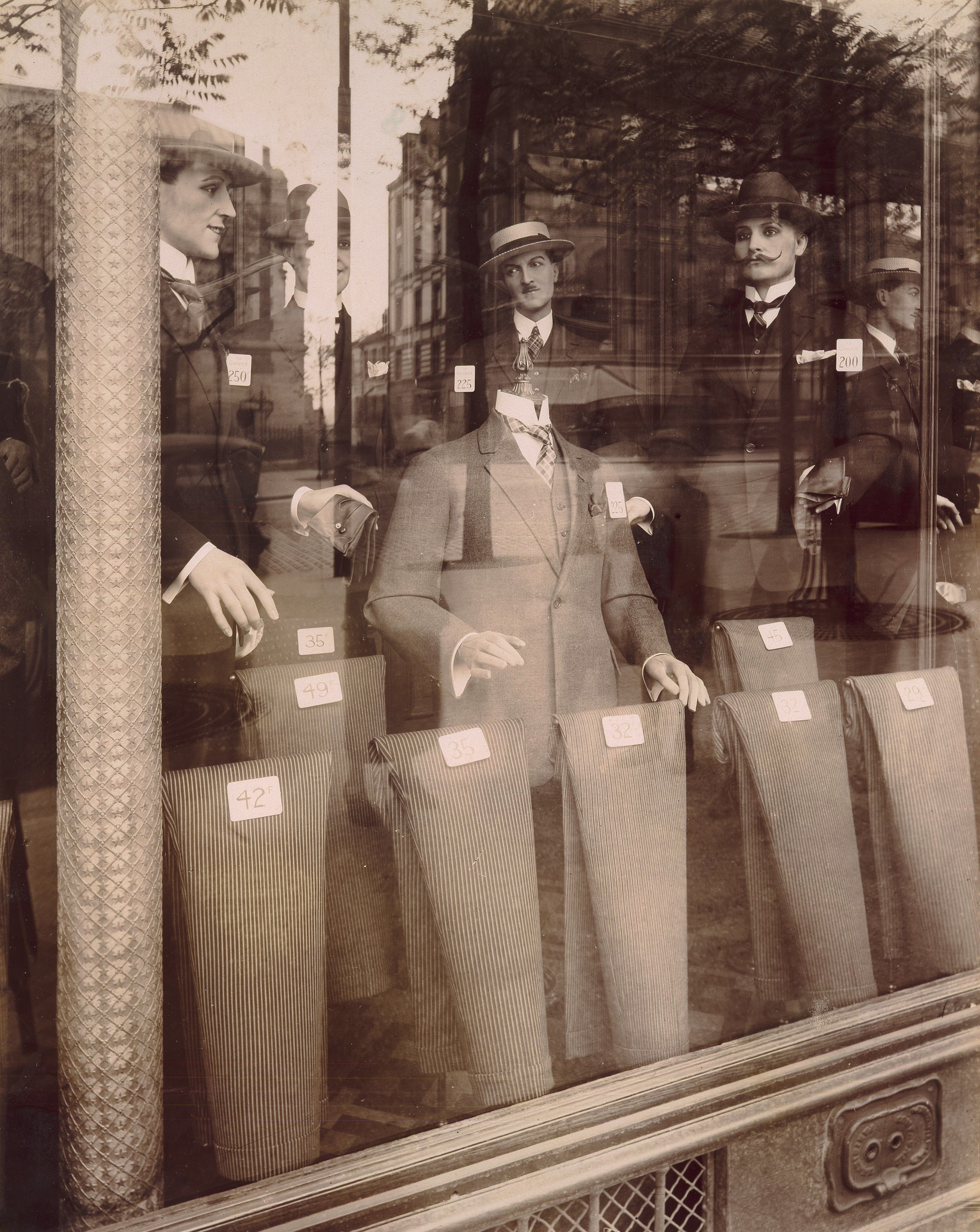 Une vitrine Avenue des Gobelins à Paris.